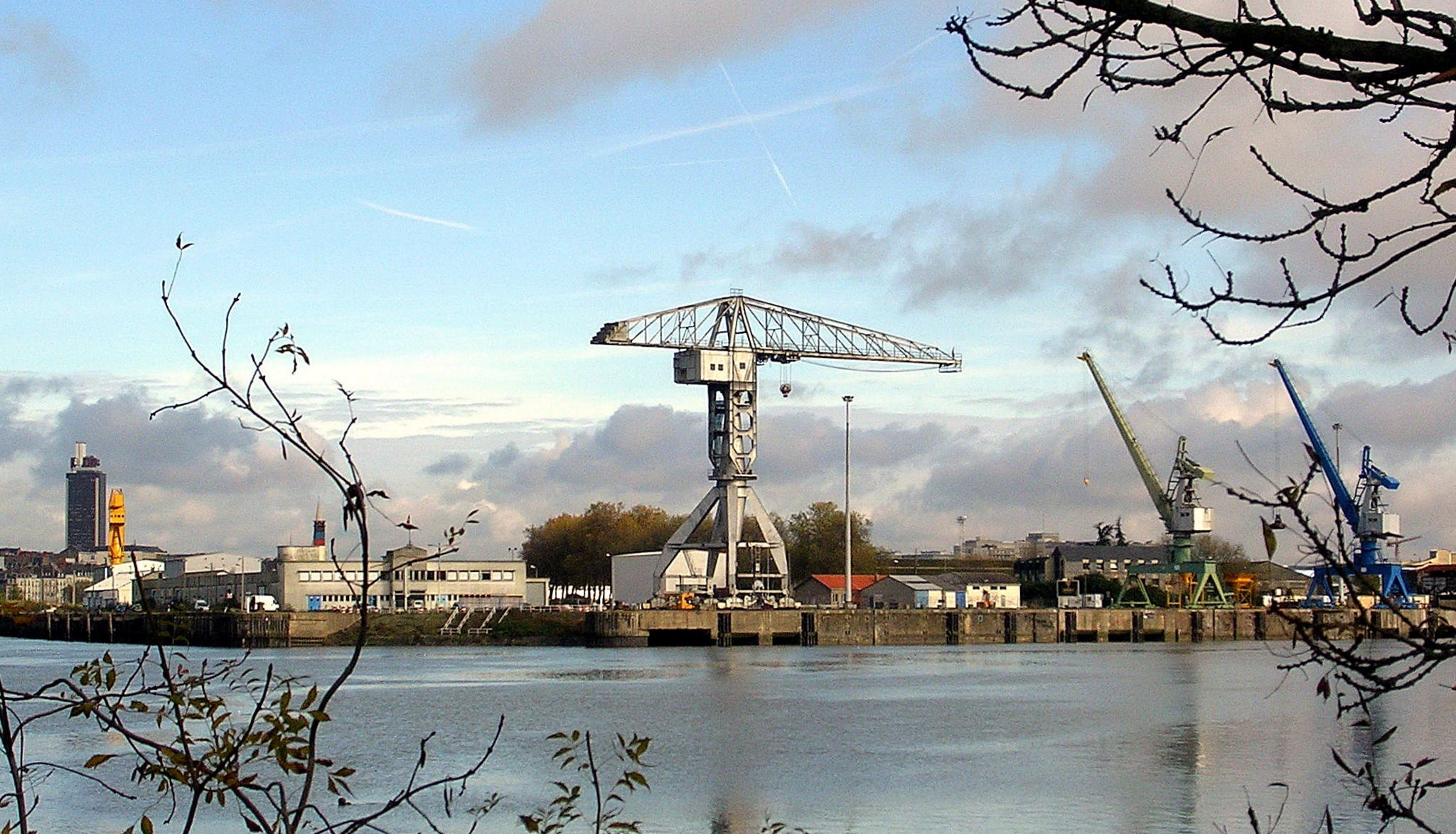 Grue Titan grise (quai Wilson, port autonome de Nantes, France). Vue du port de Trentemoult